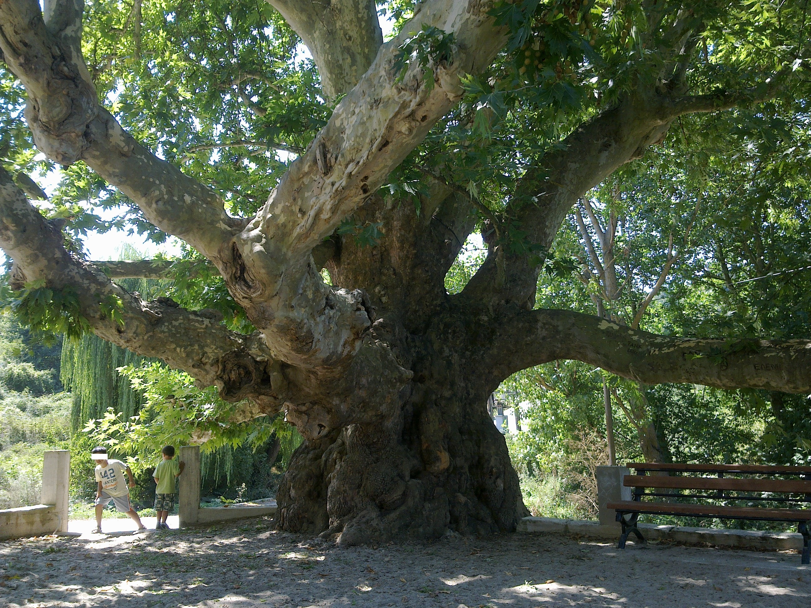 Старият платан в центъра на Катраница.